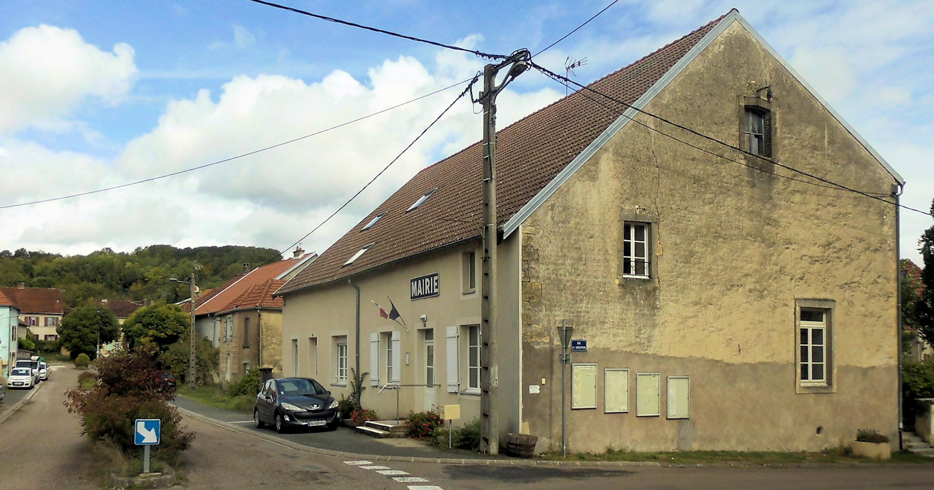 La mairie de Villars-le-Pautel